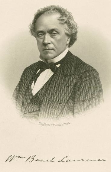 Portrait of William Beach Lawrence (1800-1881)